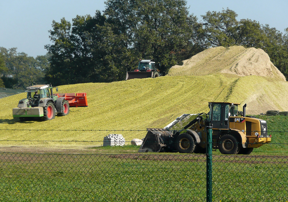 Biomassehaufen (verm. reine Maissilage) einer Biogasanlage bei Hannover